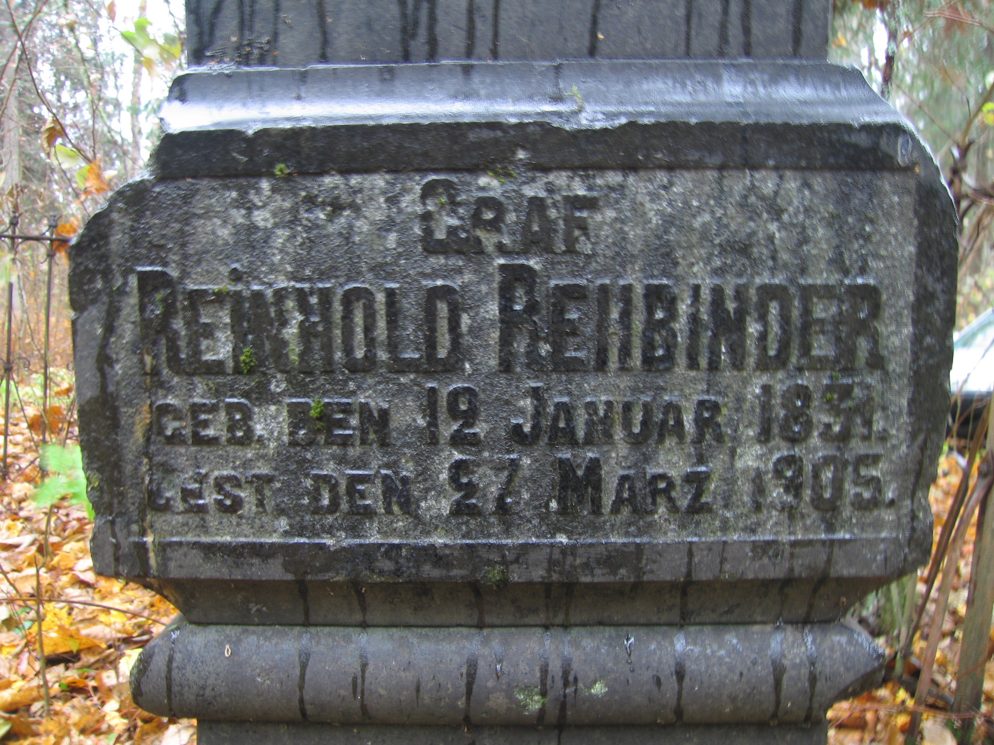 Tekstitahvel Reinhold Fabian von Rehbinderi hauatähisel